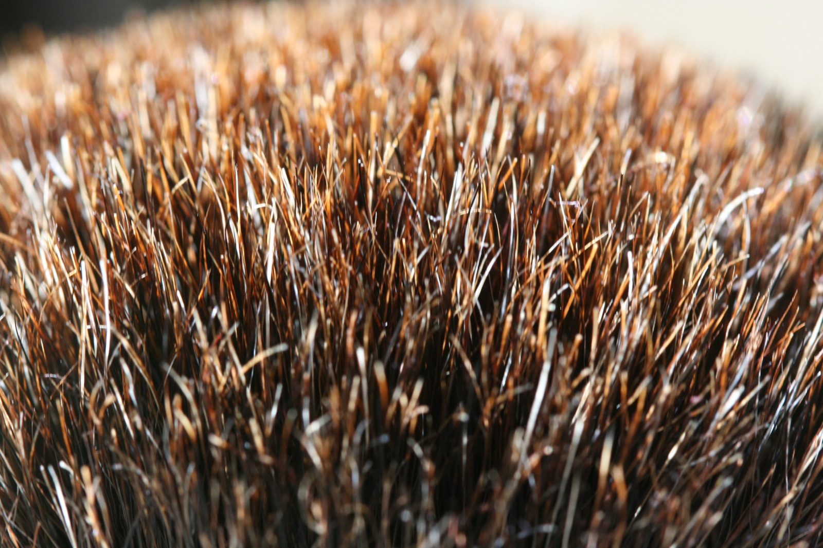 Shaving brush